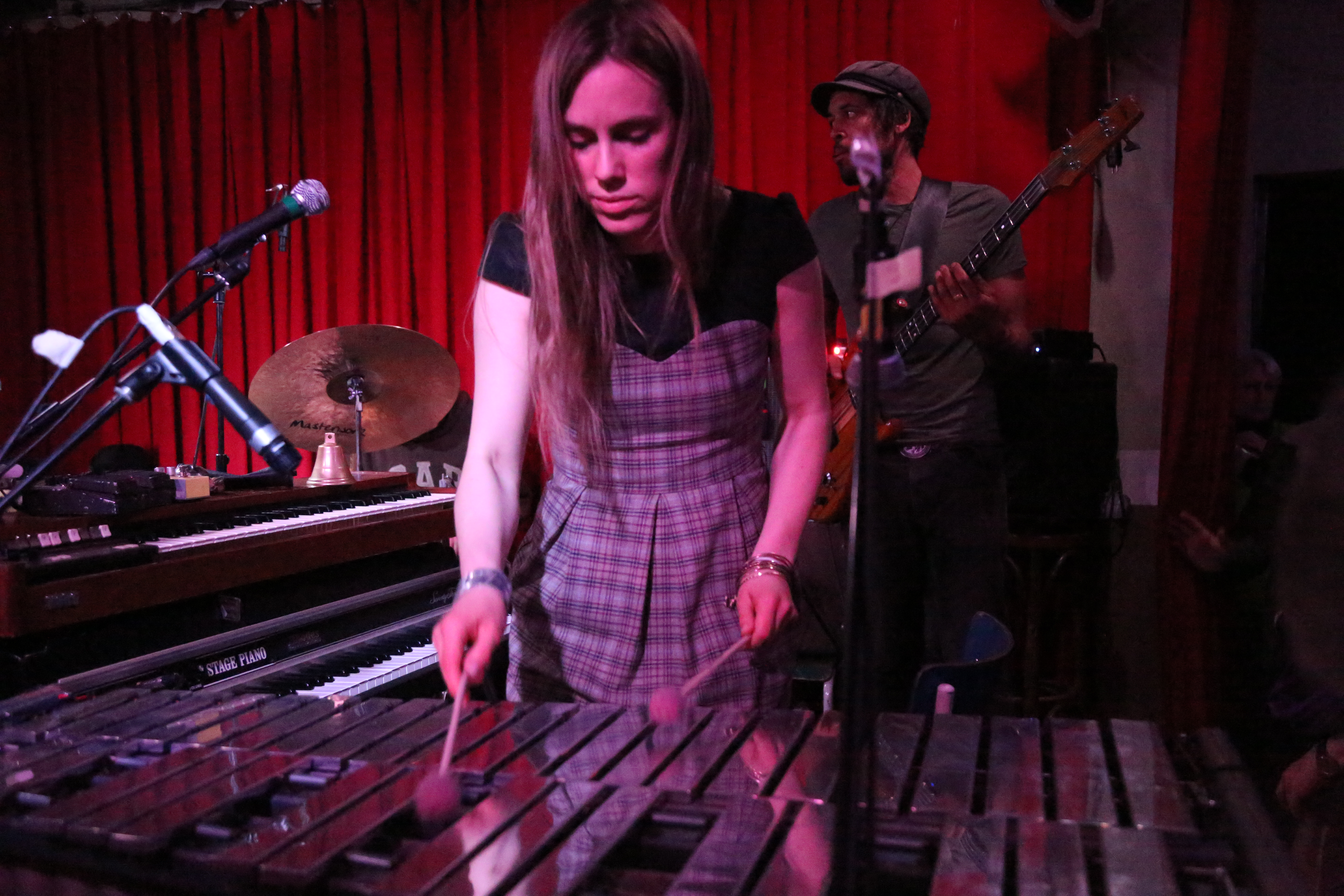 Embryo, Deutsche World-Musik-Band. Jakob Thun, Schlagzeug, Maasl Maier, Bass, Sascha Lüer, Trompete, Jan Weissenfeld, Gitarre,Wolfi Schlick, Flöte, Marja Burchard, Vibraphone, Keyboard, Posaune. Studio-Konzert am 2019-04-19 in München